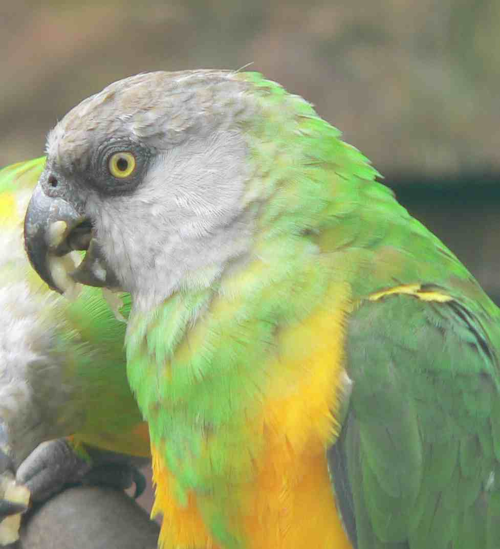 Poicephalus senegalensus